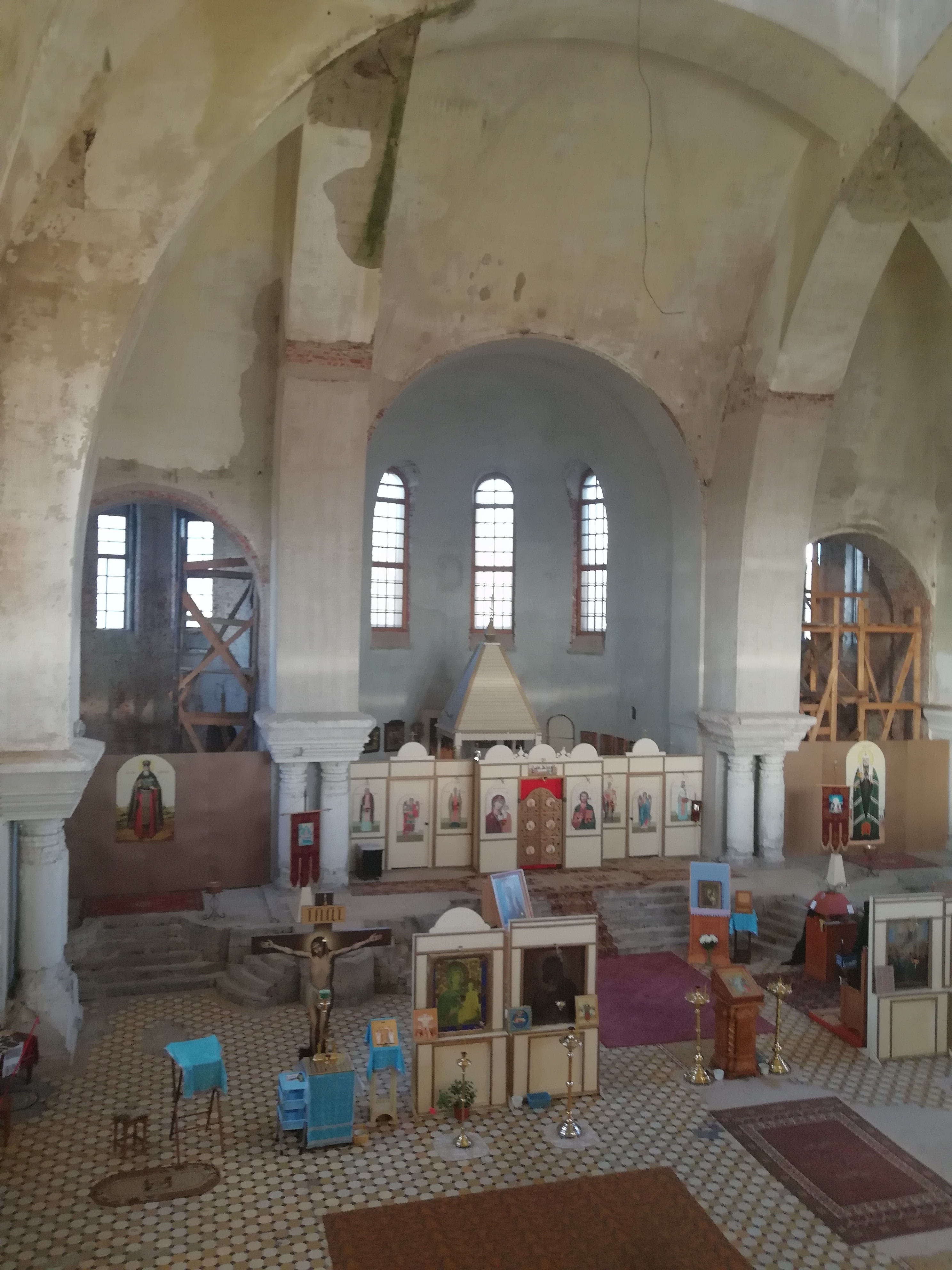 Интерьер храма сверху